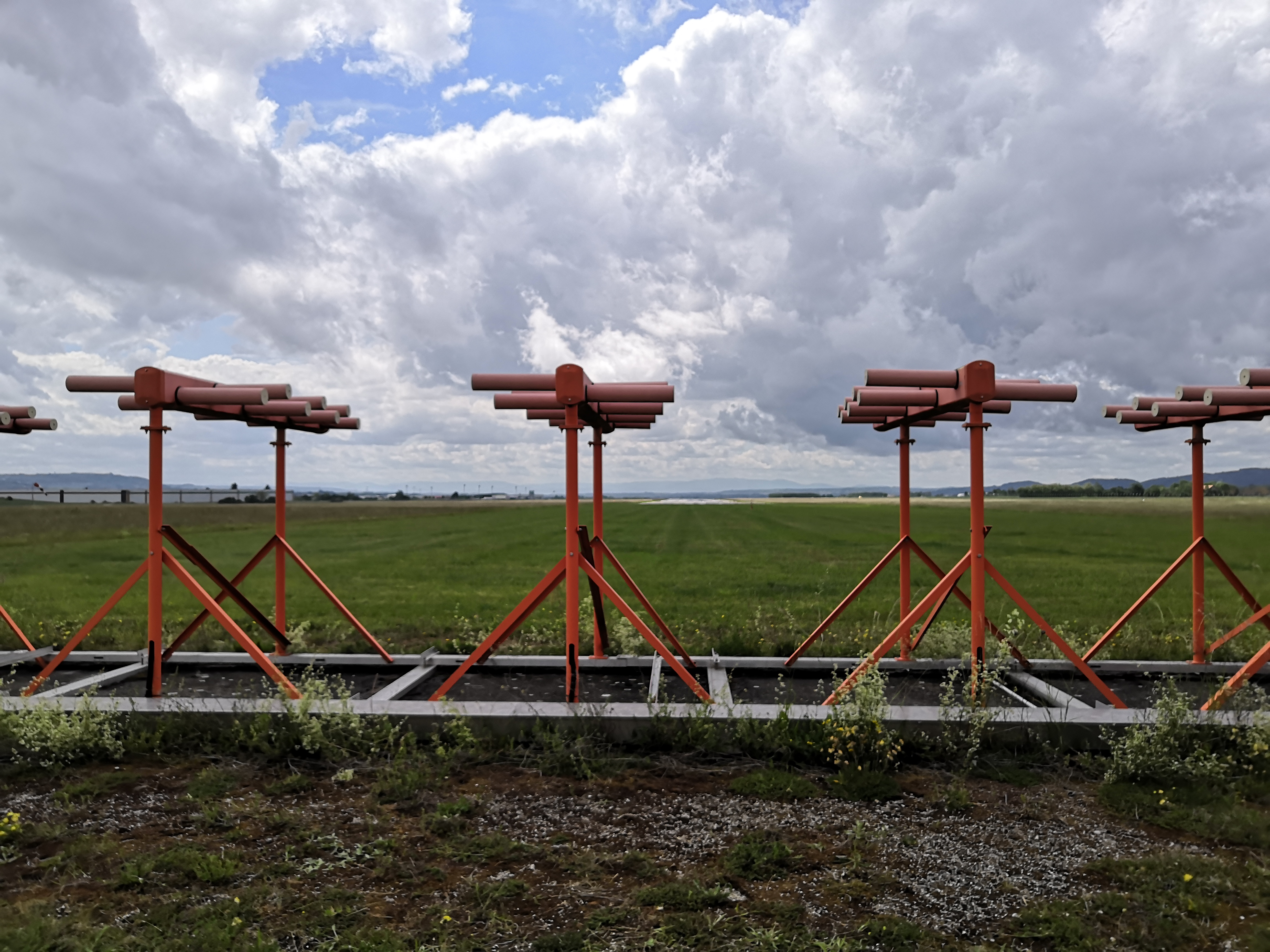 Instrument Landing System